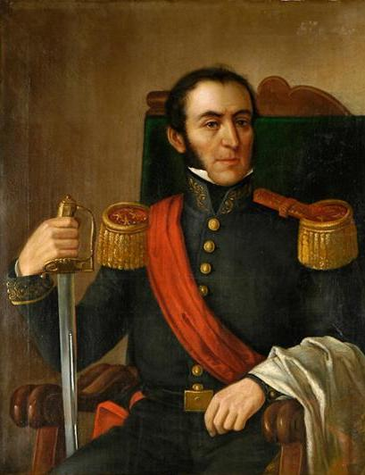 Oleo oficial de los gobernadores de Chile, forma parte de la coleccion de retratos de los gobernadores de Chile.